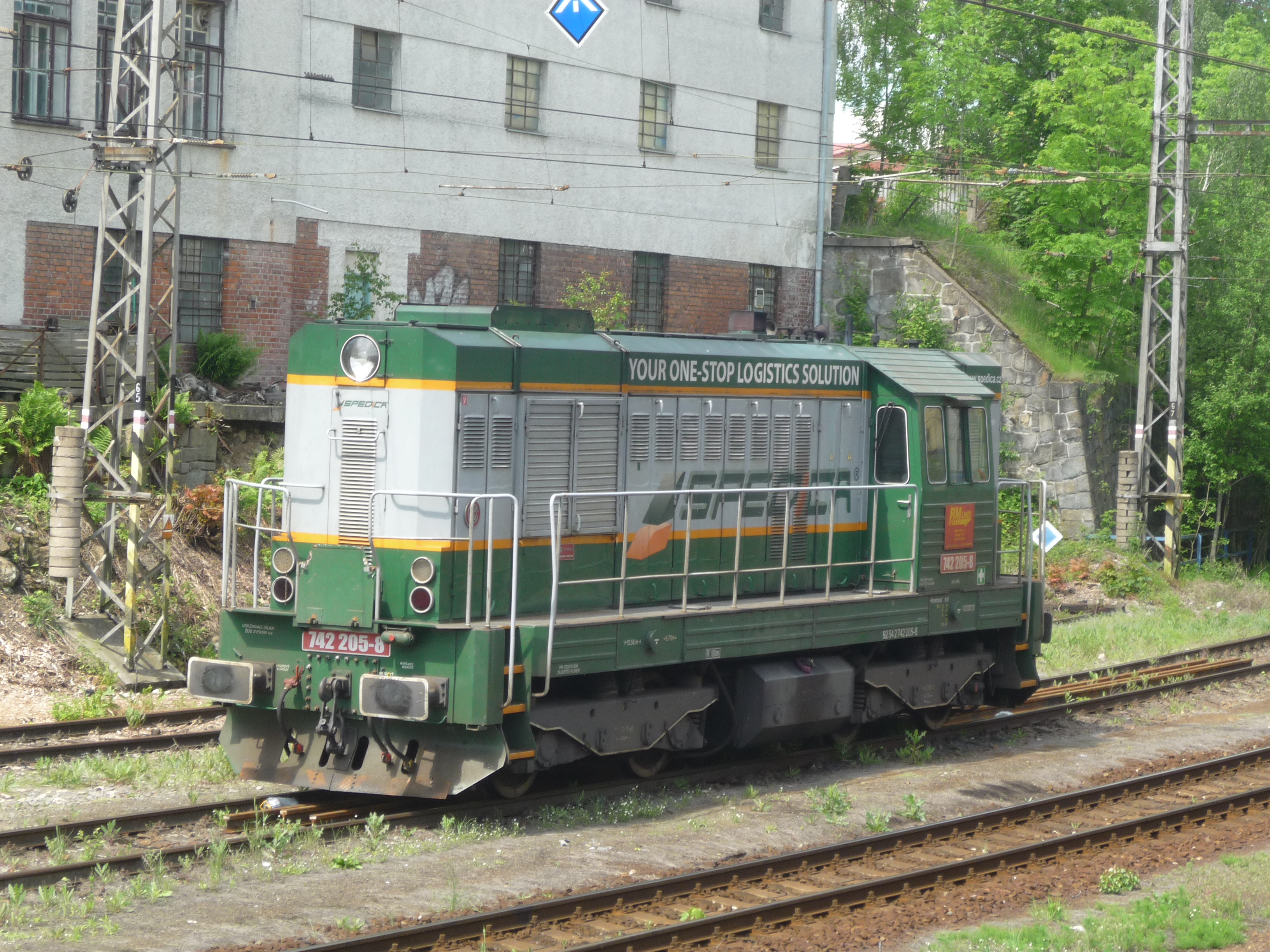 Autor fotografie Jiří Zelenka.CZ Class 742 205 - 8 RM LINES a.s. Viz. CZ Class 742. RM LINES a.s.Sokolov (Jednoty 1931). Železniční stanice Havlíčkův Brod. Trať směr Praha. Czech Republic.